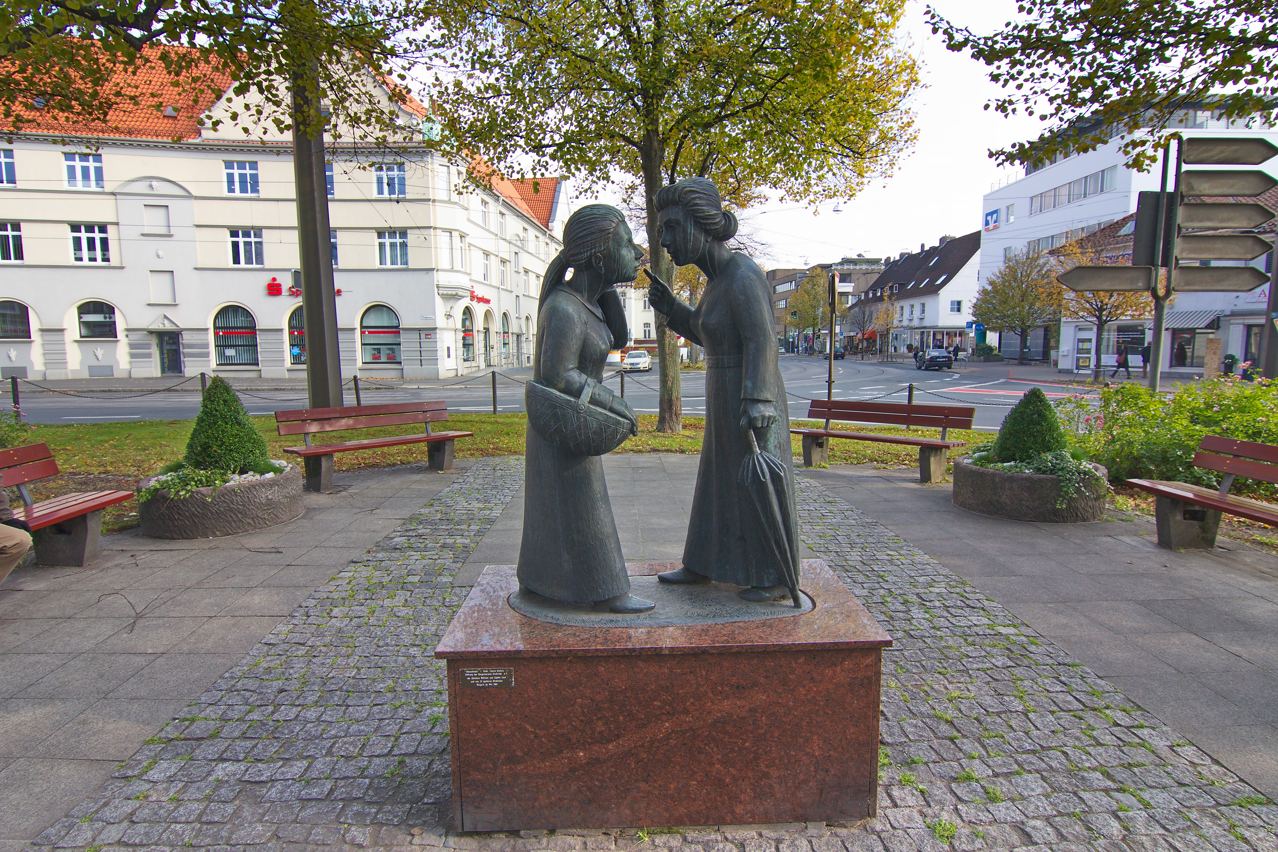 "Klönschnack" des Bildhauers Fidelis Bentele im Ortszentrum an der Tiergartenstraße in Kirchrode (Hannover), Niedersachsen, Deutschland